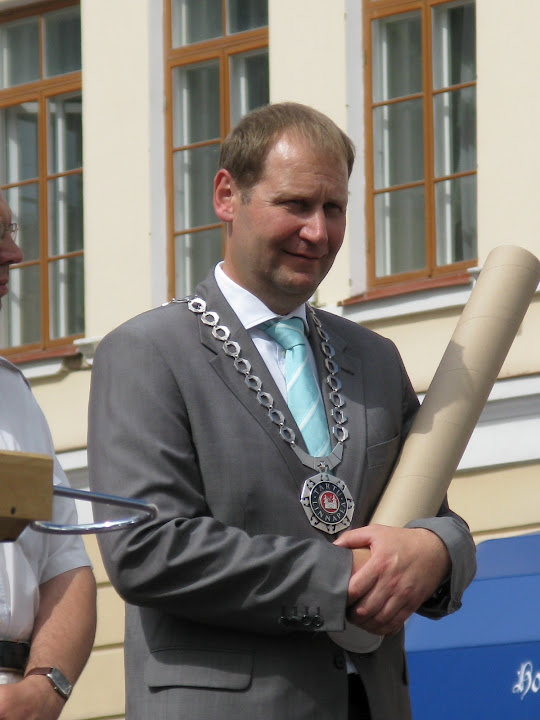 Tartu linnapea Urmas Kruuse Tartu kuulutamisel maailma füüsikapealinnaks Tartu hansapäevade raames Raekoja platsil, 20. juuli 2012. Foto: Oop.